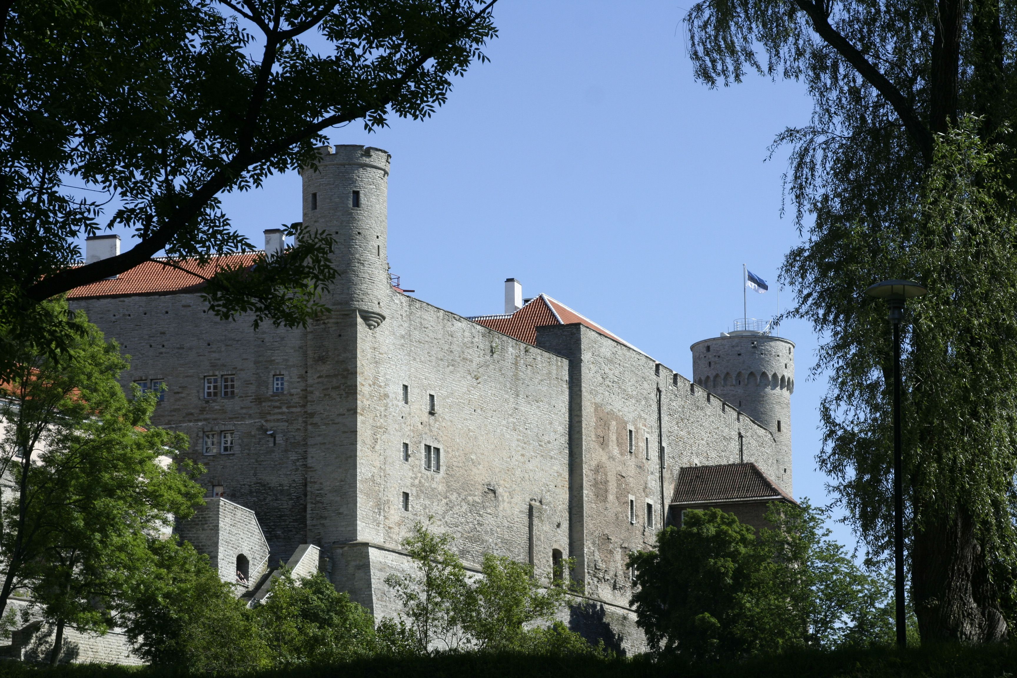 Toompea loss